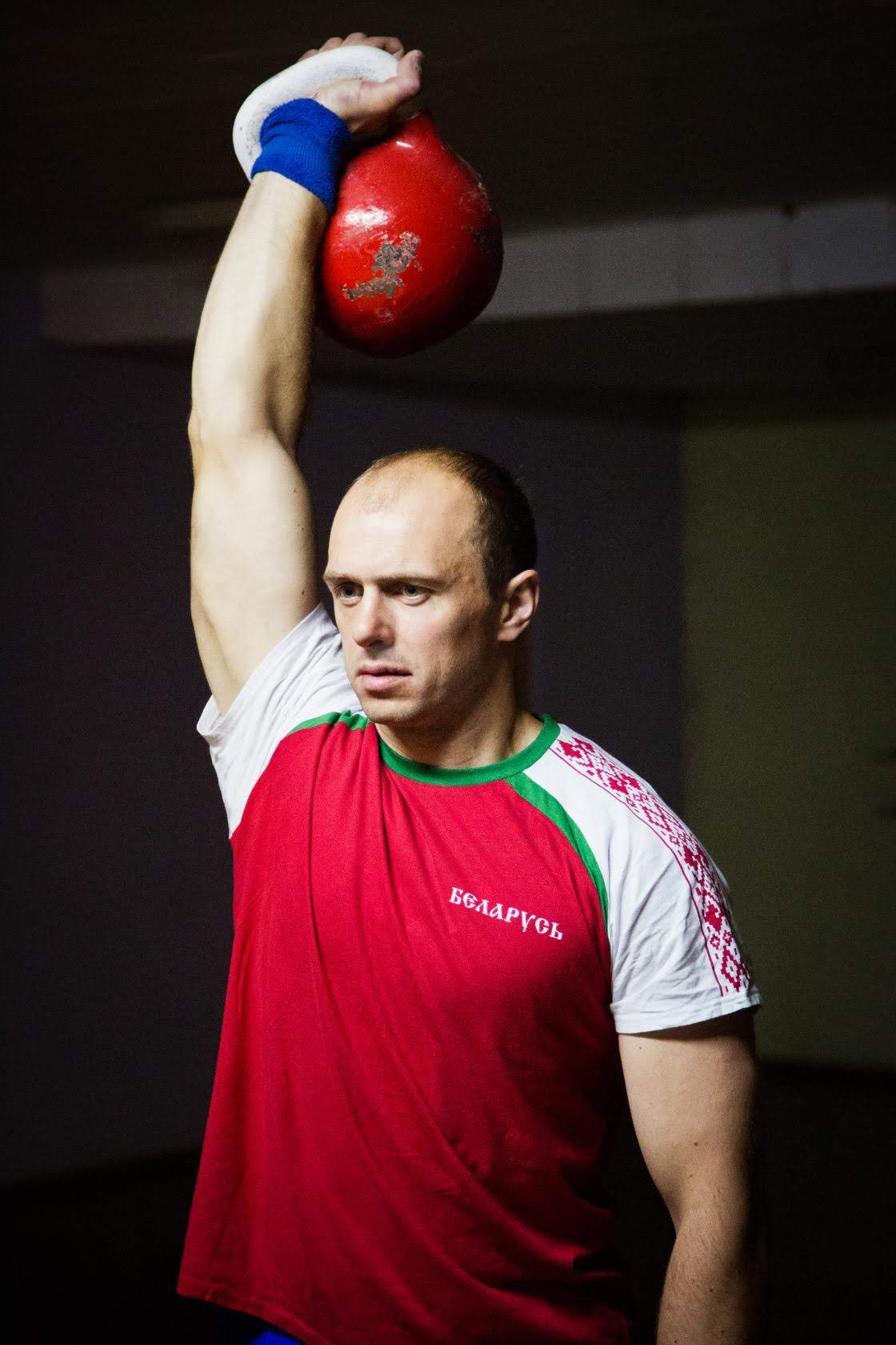 Гири , Спорт